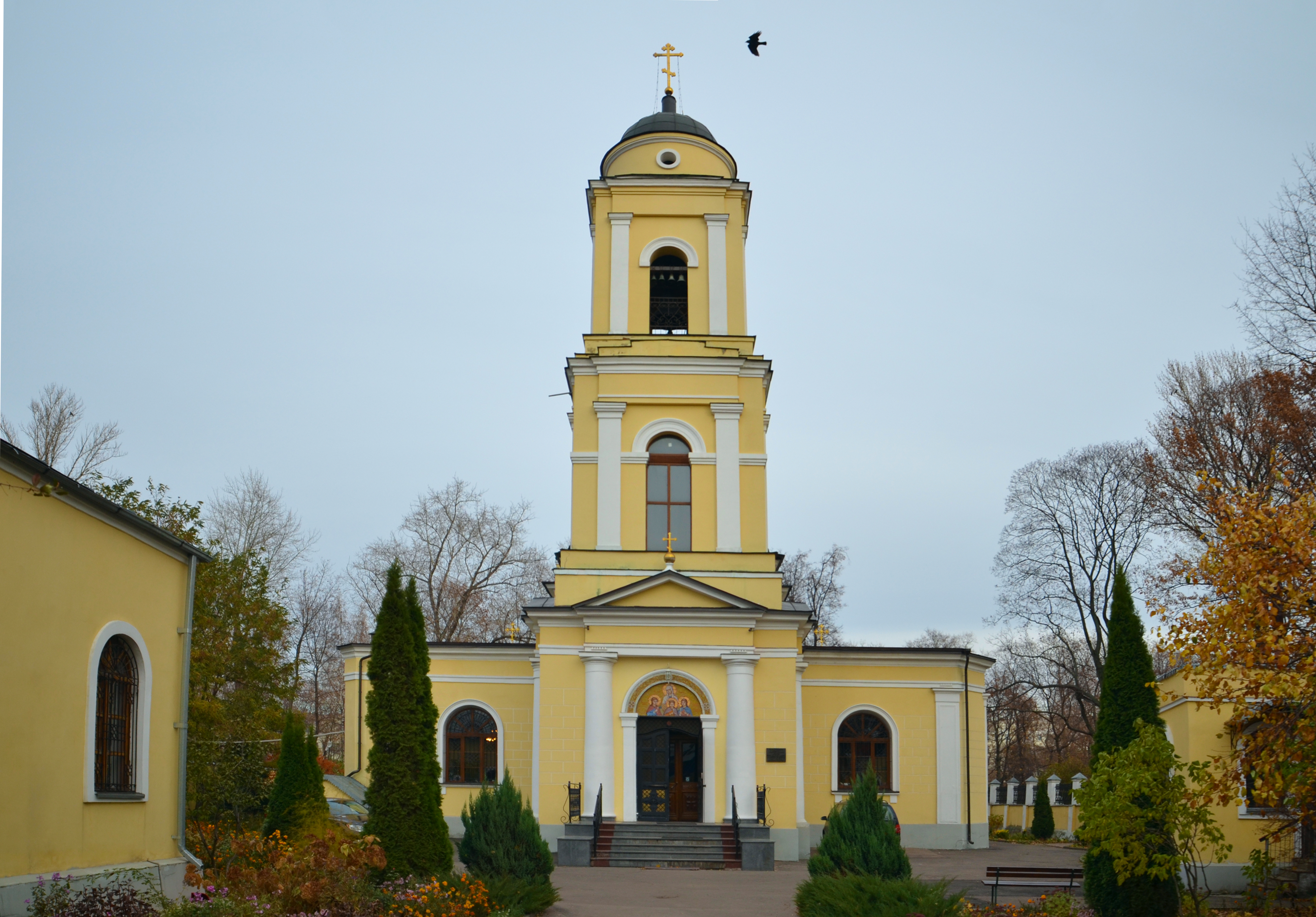 Церковь мучениц Веры, Надежды, Любови и матери их Софии (церковь Миусского кладбища) (Москва и Московская область, Москва, Сущевский Вал улица, 21, Савеловский пр., 8-10)